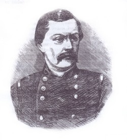 Ludwig Narbutt